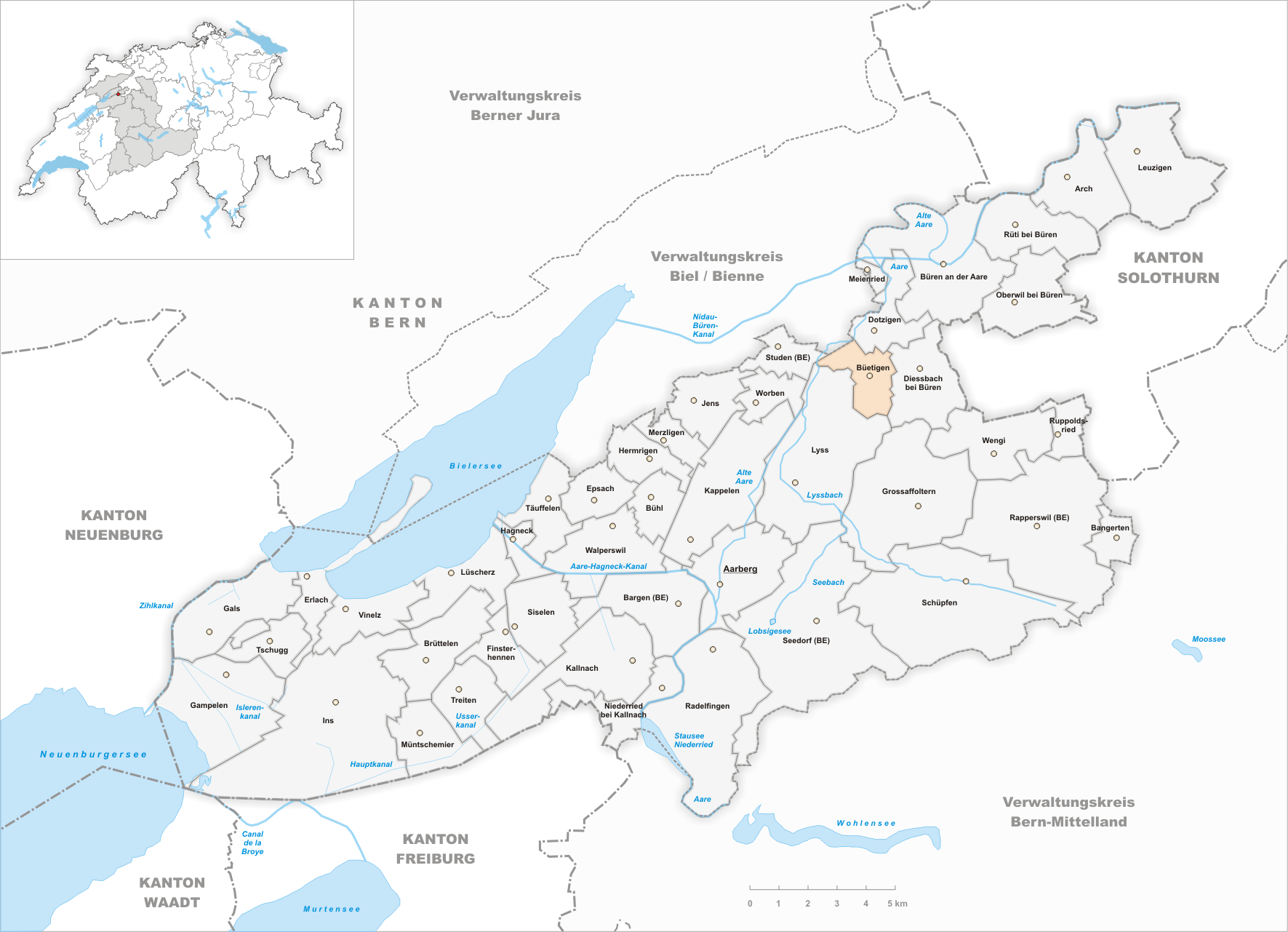 Municipality Büetigen